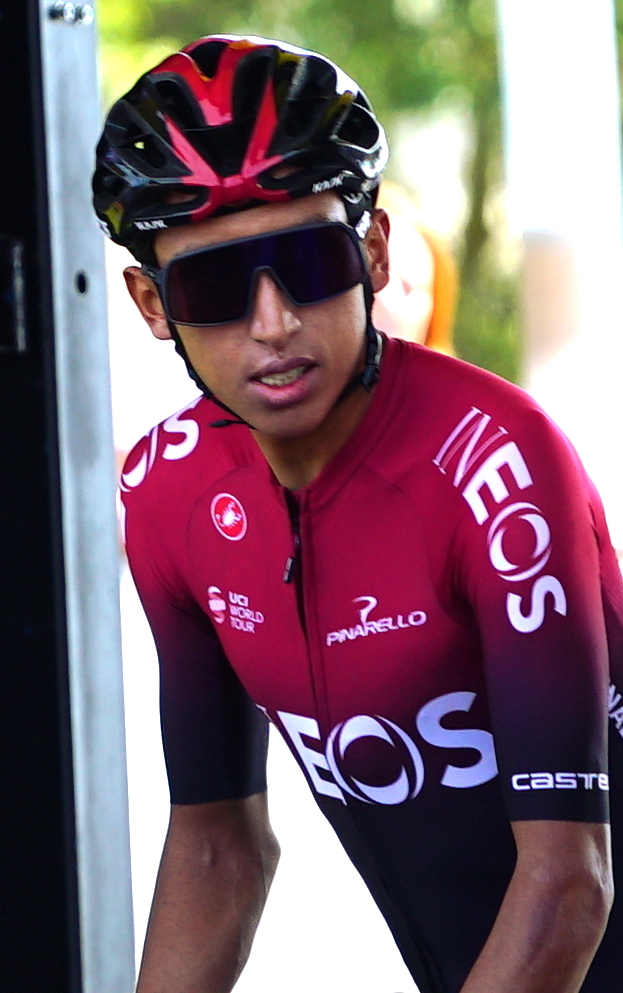 signature lors de l'étape à Reims.